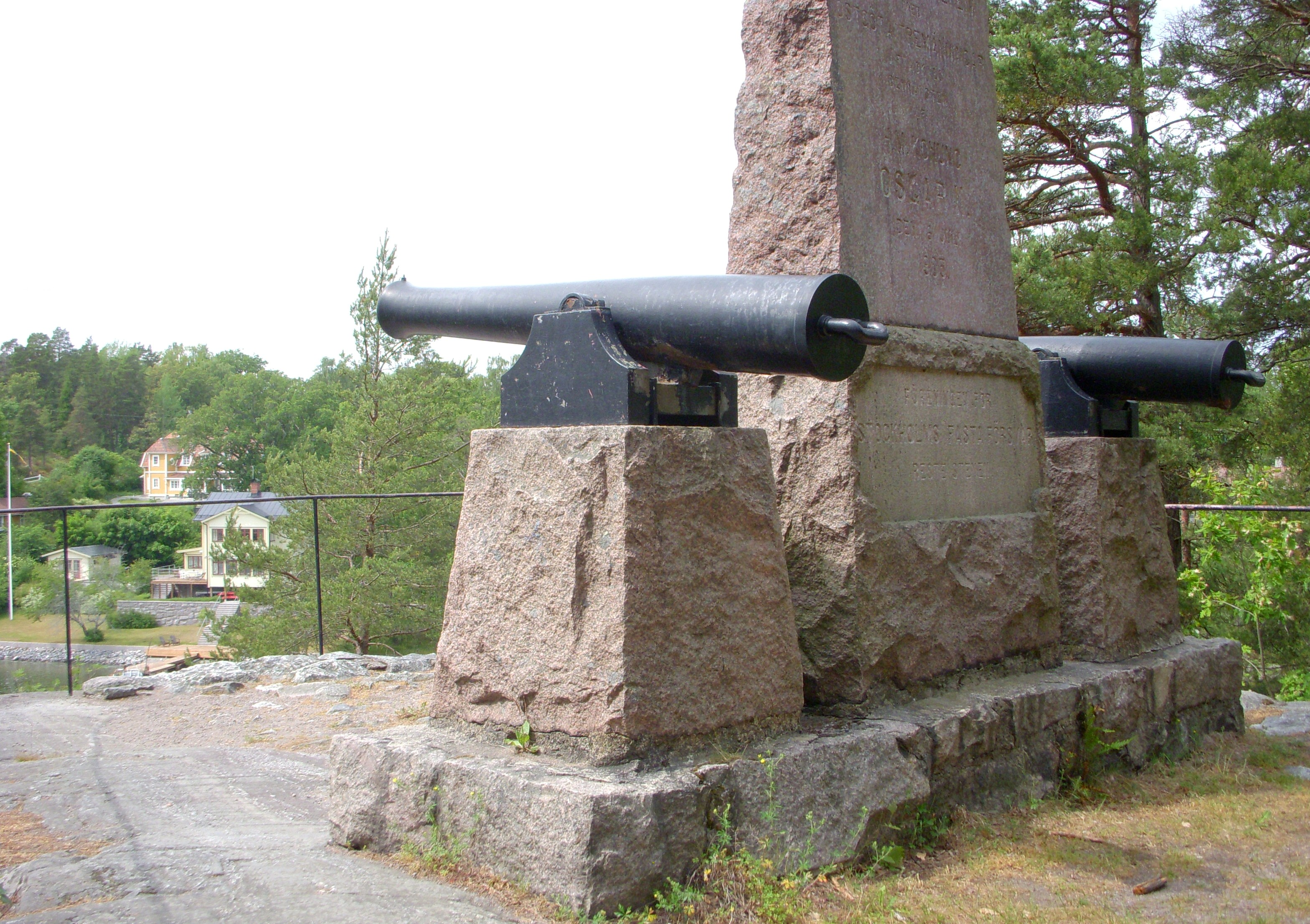 Skogsömonumentet vid Baggenstäket till minnet av "slaget vid Stäket", rest 1905